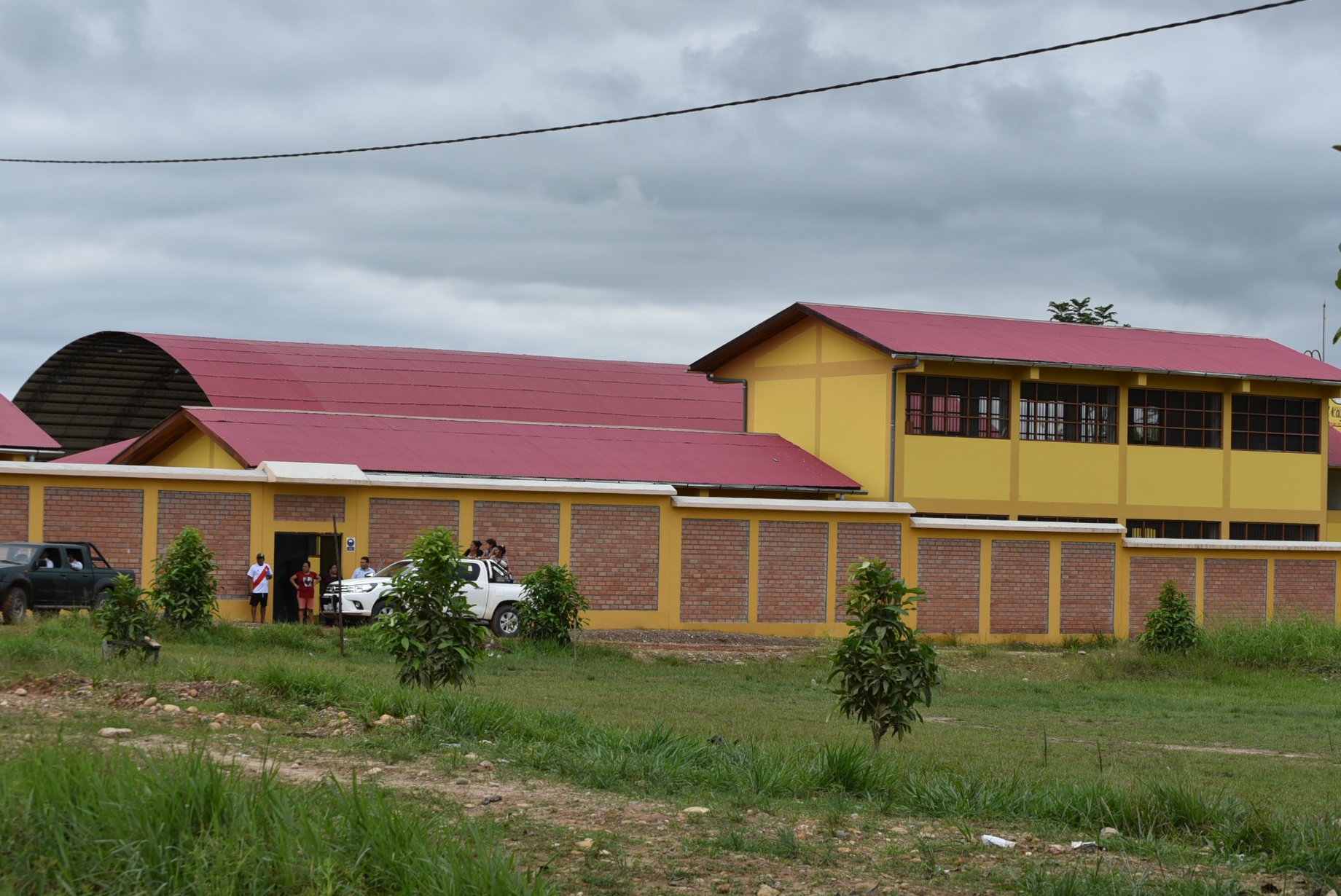 Institución Educativa "Waldemar Soria Rodríguez", ubicado en la carretera Neshuya – Curimaná, Km.21, Caserío Pueblo Libre, Distrito de Curimaná, Provincia y UGEL de Padre Abad en la Región Ucayali.